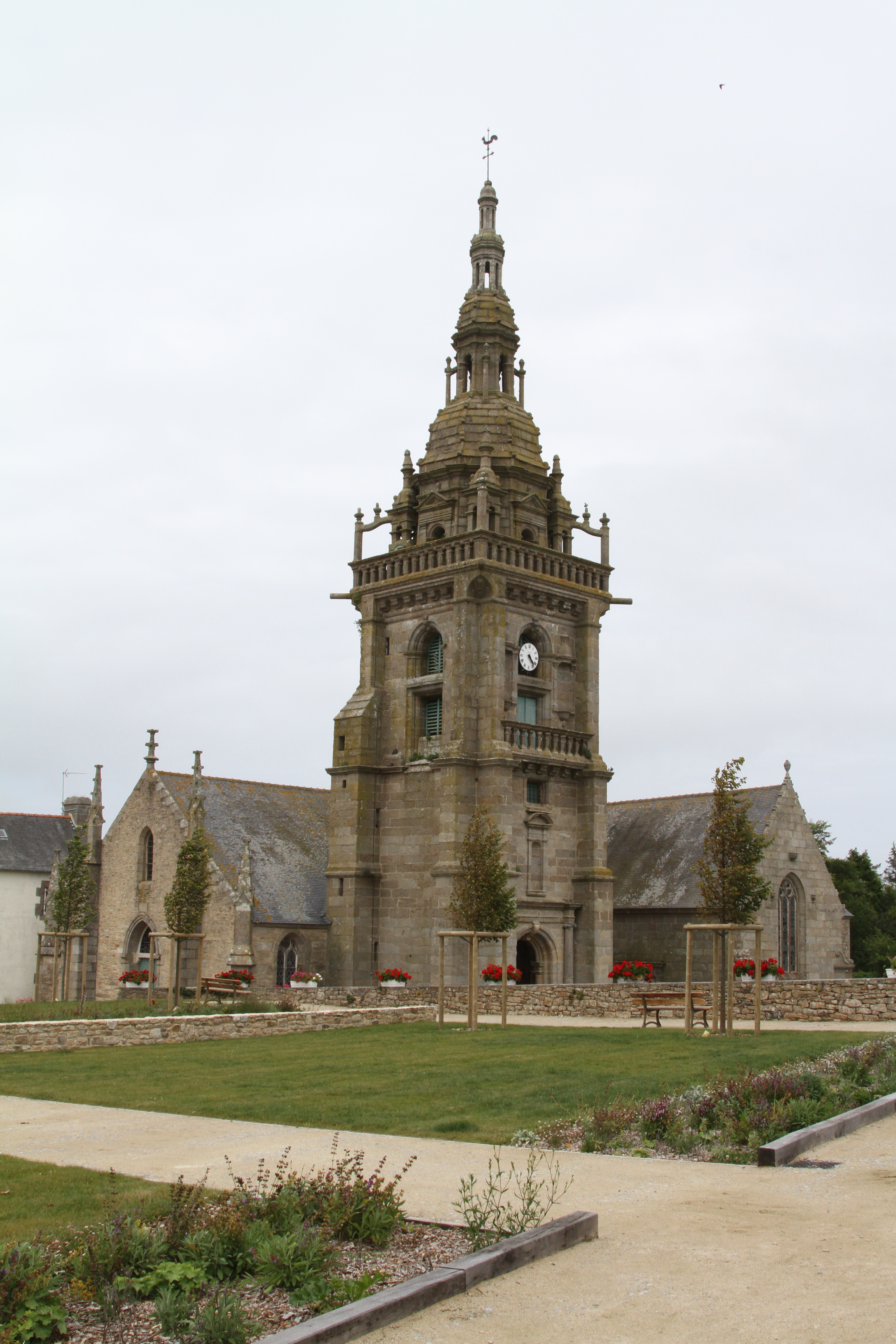 Église Saint-Paul Aurélien de la commune de Lampaul-Ploudalmézeau